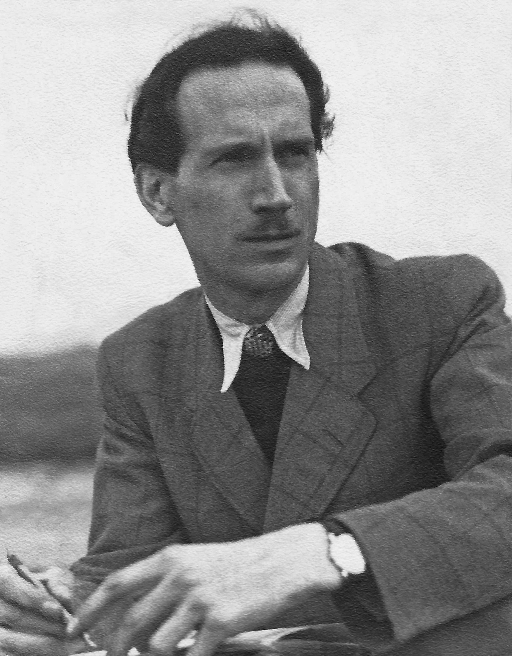 Luigi Martignon intento a disegnare, ripreso a Schweidnitz nel 1944